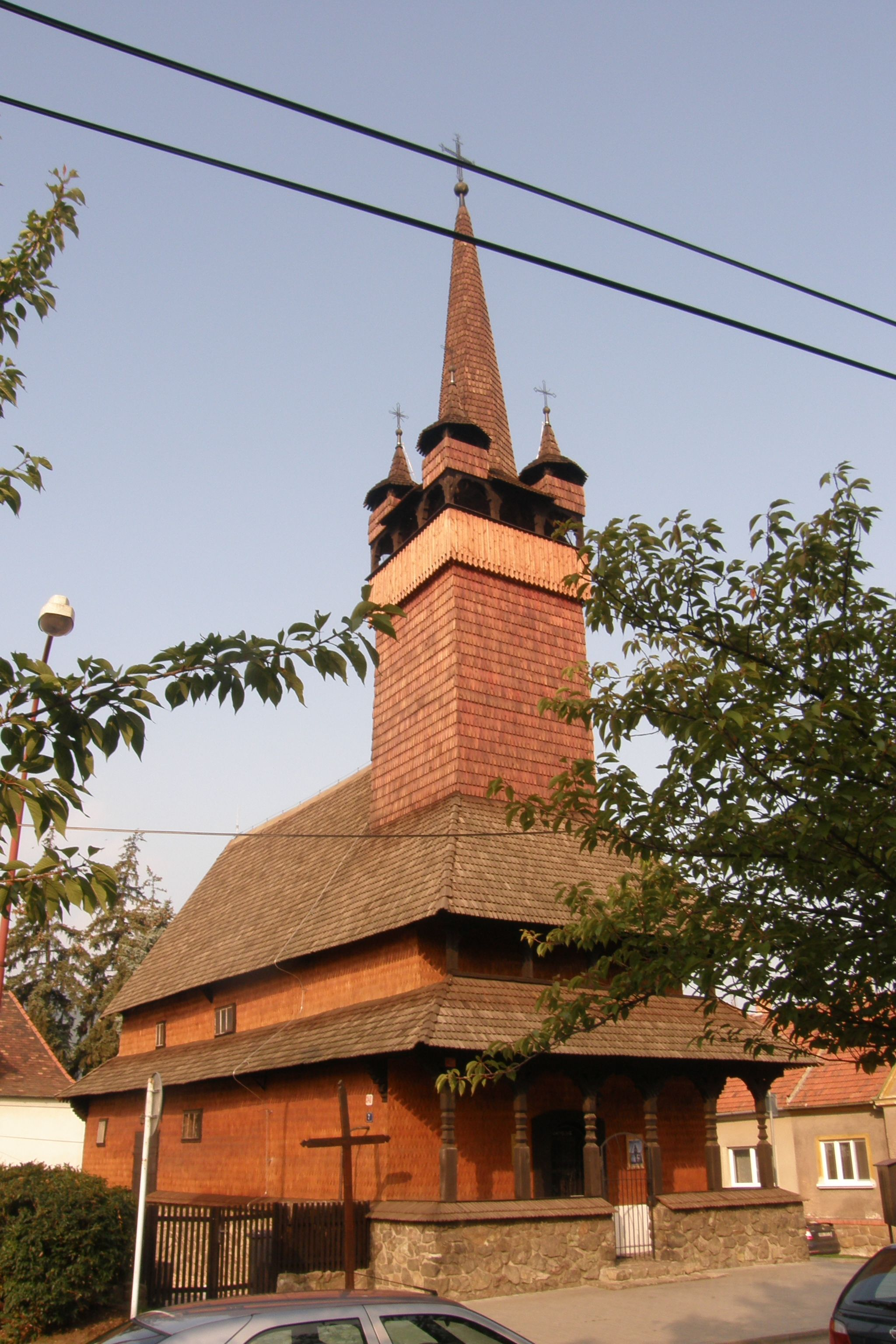 Kostel Církve československé husitské (Blansko), Rodkovského 1140/7, Blansko